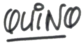 Firma de Quino, humorista gráfico e historietista hispano-argentino.